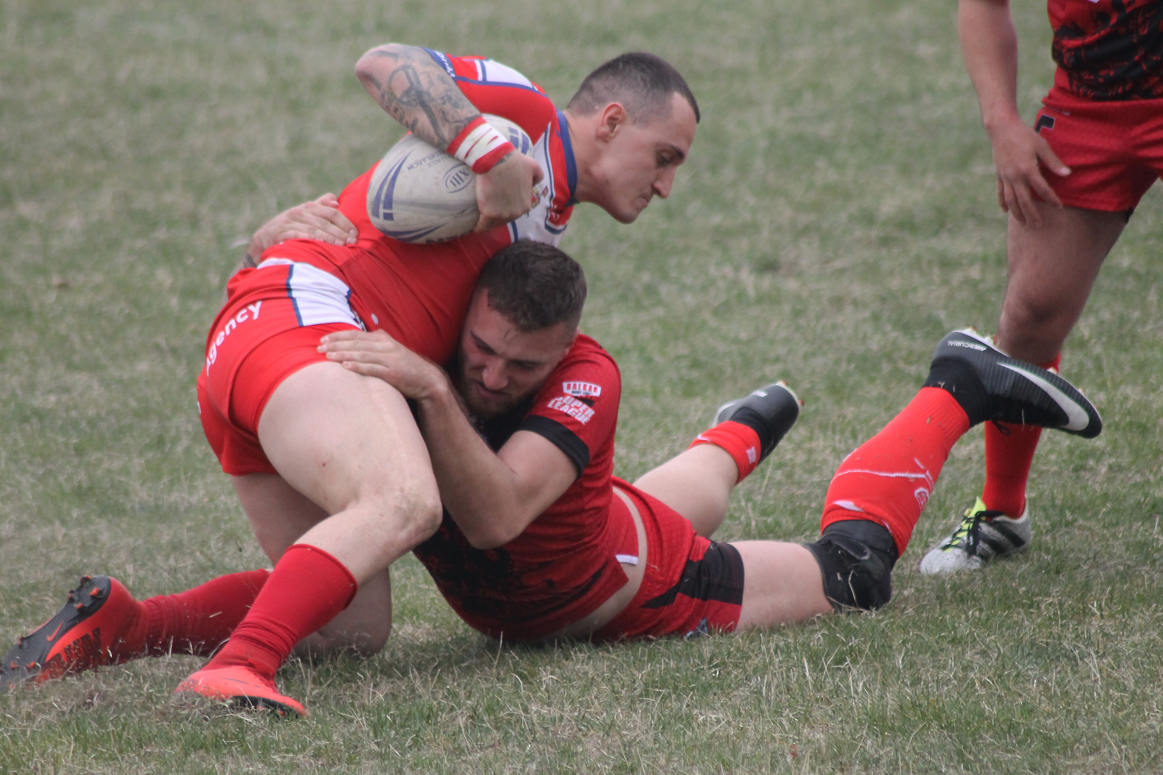 Локомотив Сф срещу Раднички Ниш